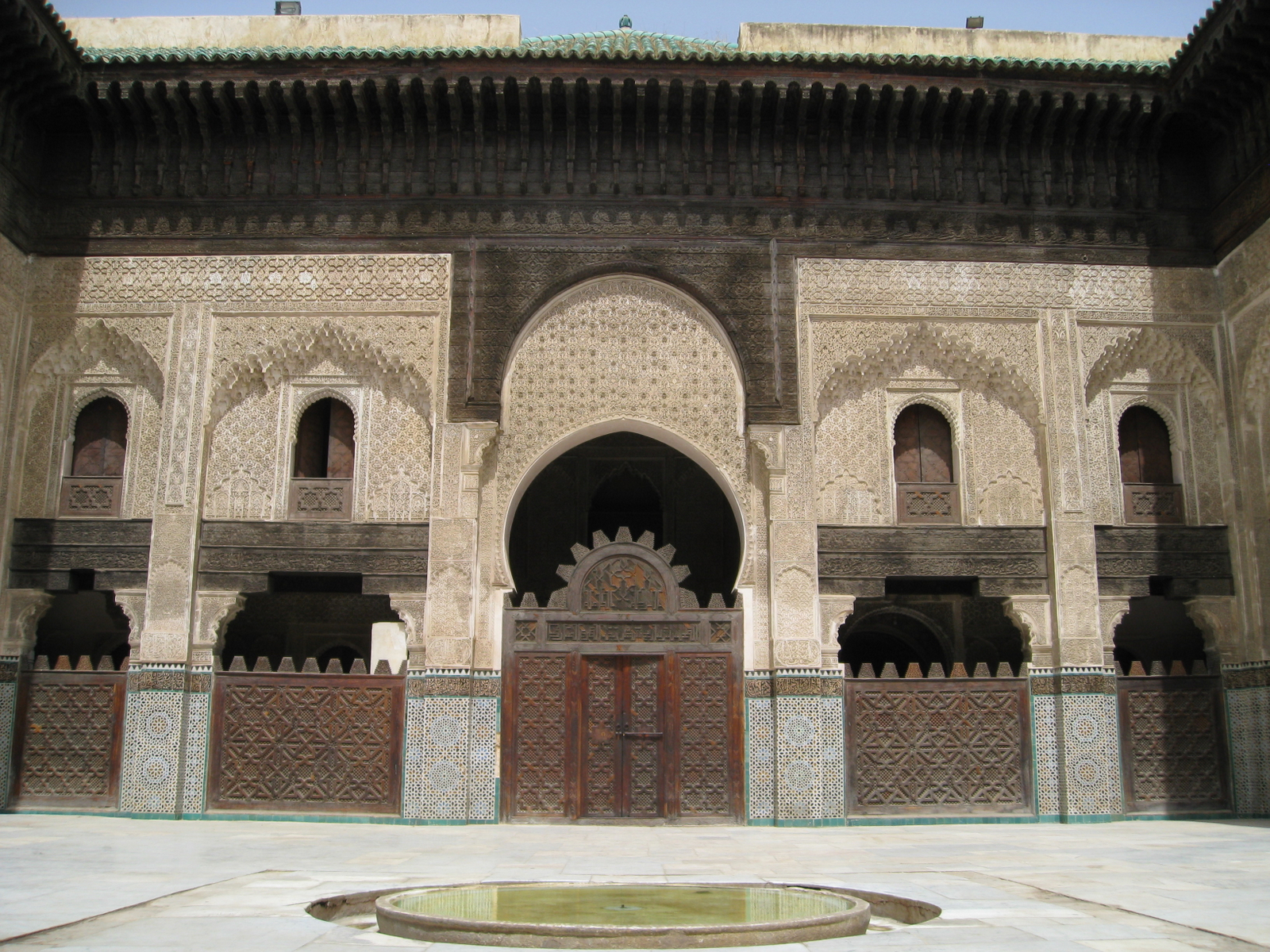 Madrasa Bou Inania